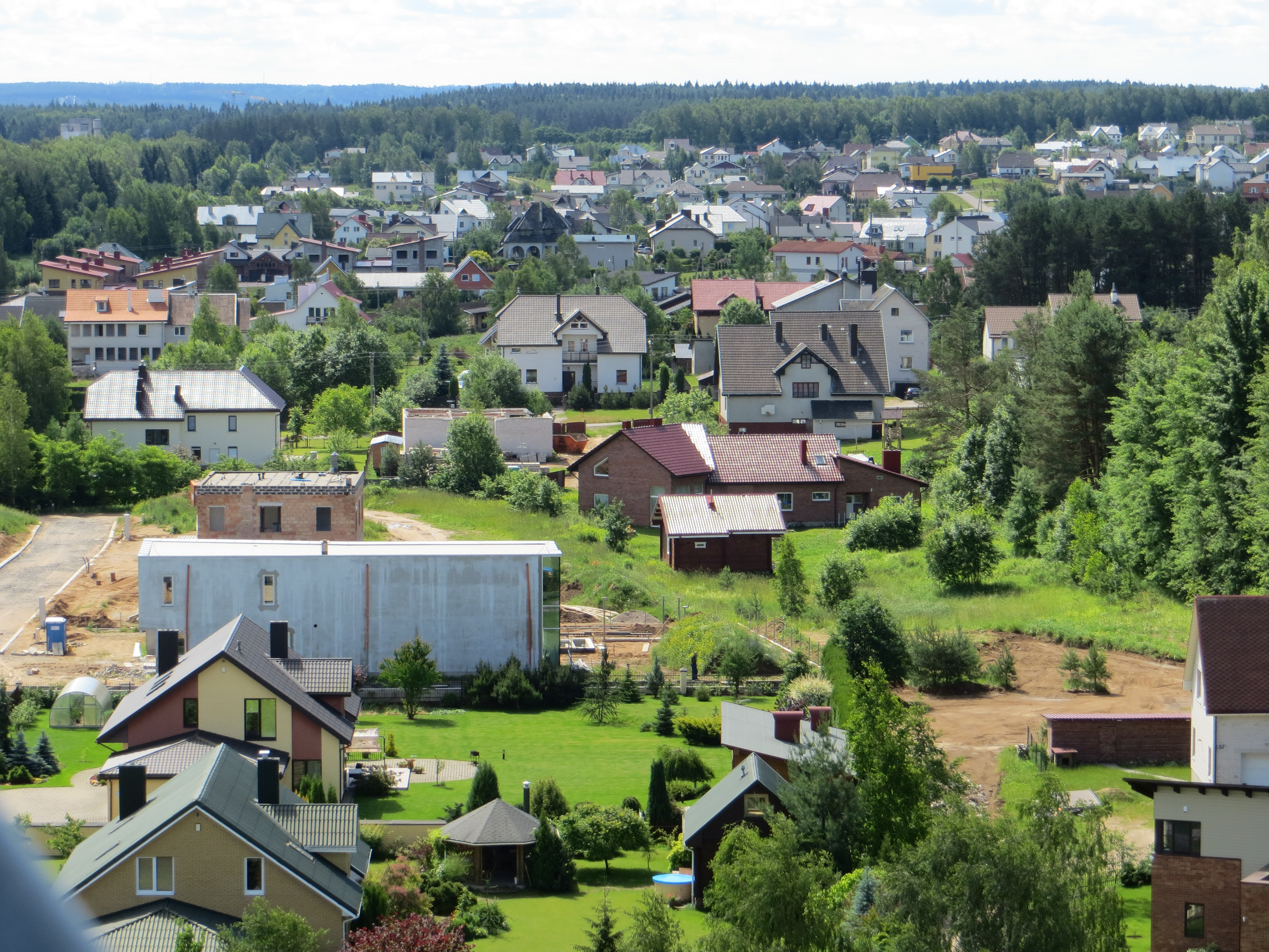 Didžioji Riešė, Lithuania